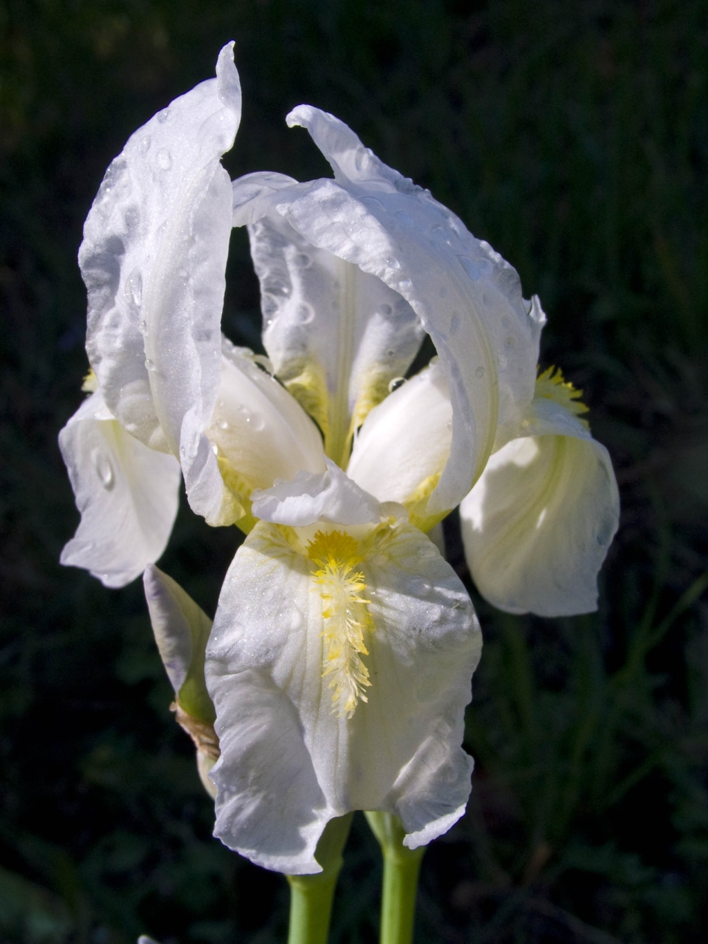 Hrvatska perunika (Iris croatica), Dramalj